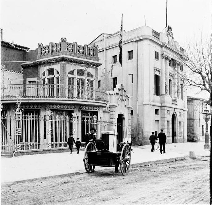 Casa de la Vila a Masnou. Josep Salvany i Blanch (1912)